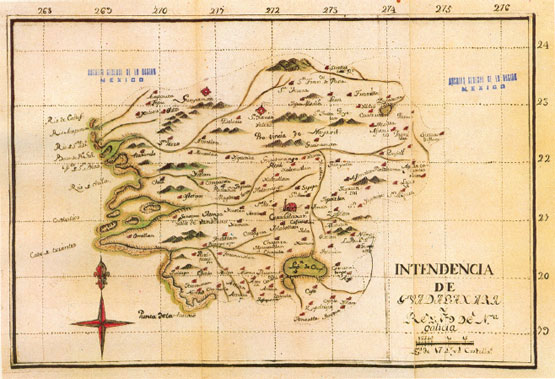 Mapa de la Intendencia de Guadalajara